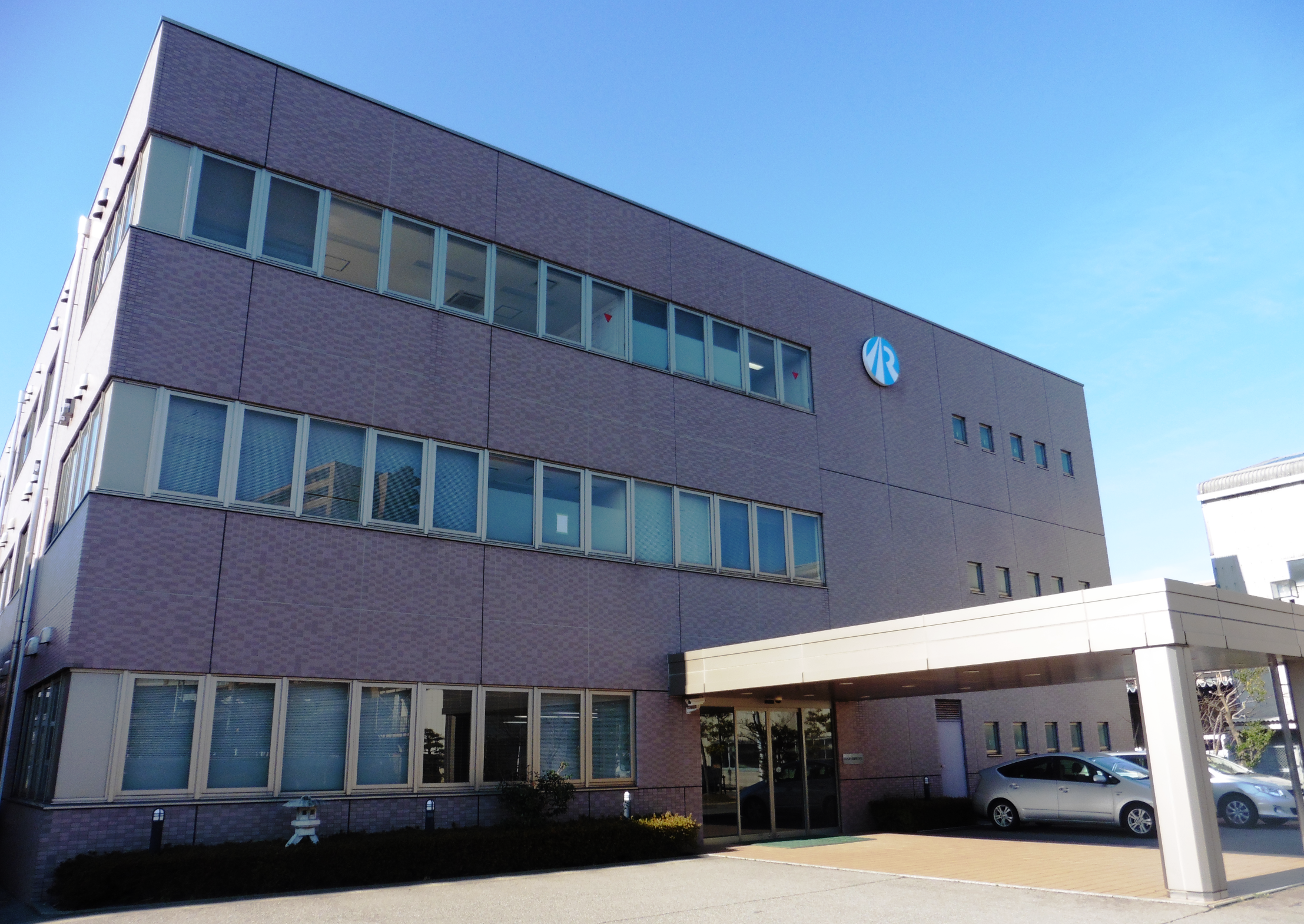 IRいしかわ鉄道本社ビル